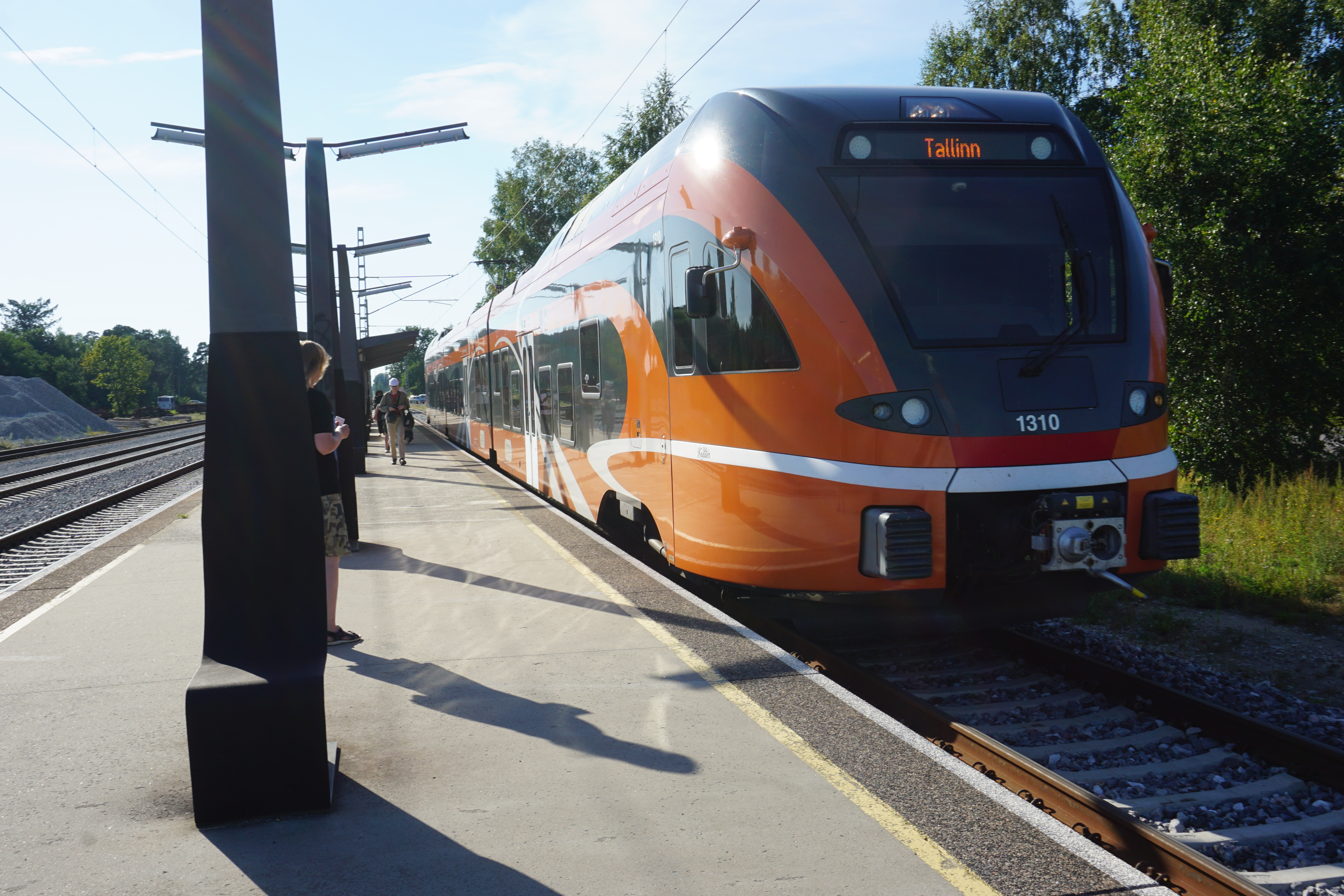 Elroni reisirong Stadler FLIRT EMU saabumas Klooga jaama